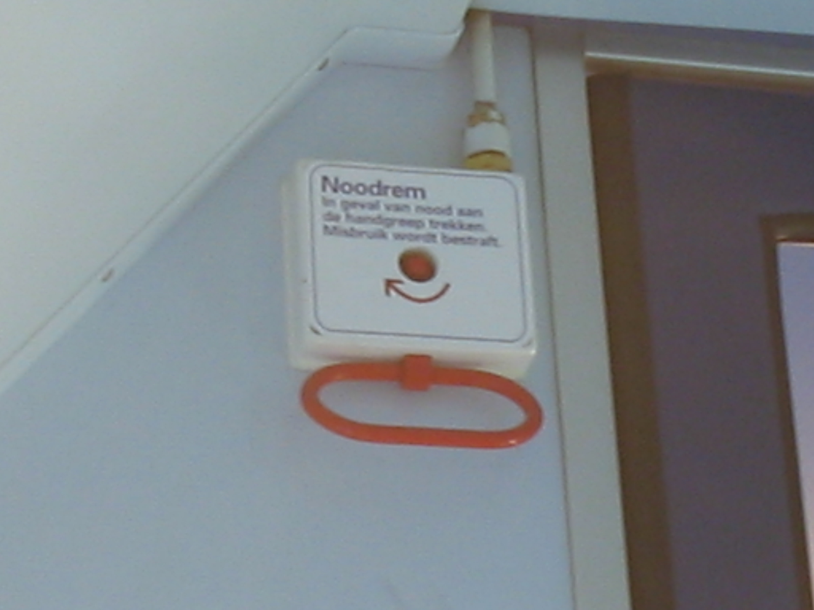 Noodrem